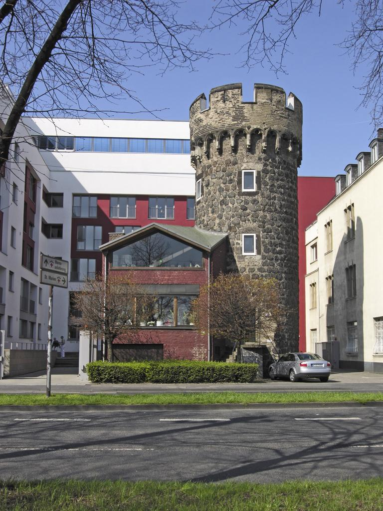 Köln, Weckschnapp This is a photograph of an architectural monument.